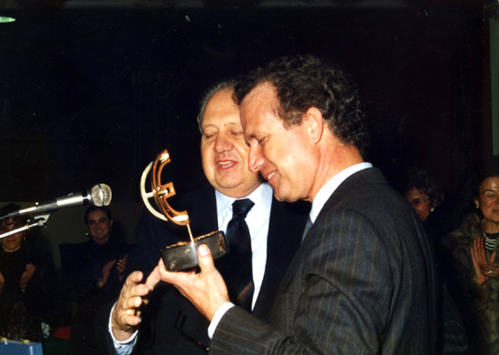 Condecoração de Mário Soares com o prémio CE a Ilídio Pinho